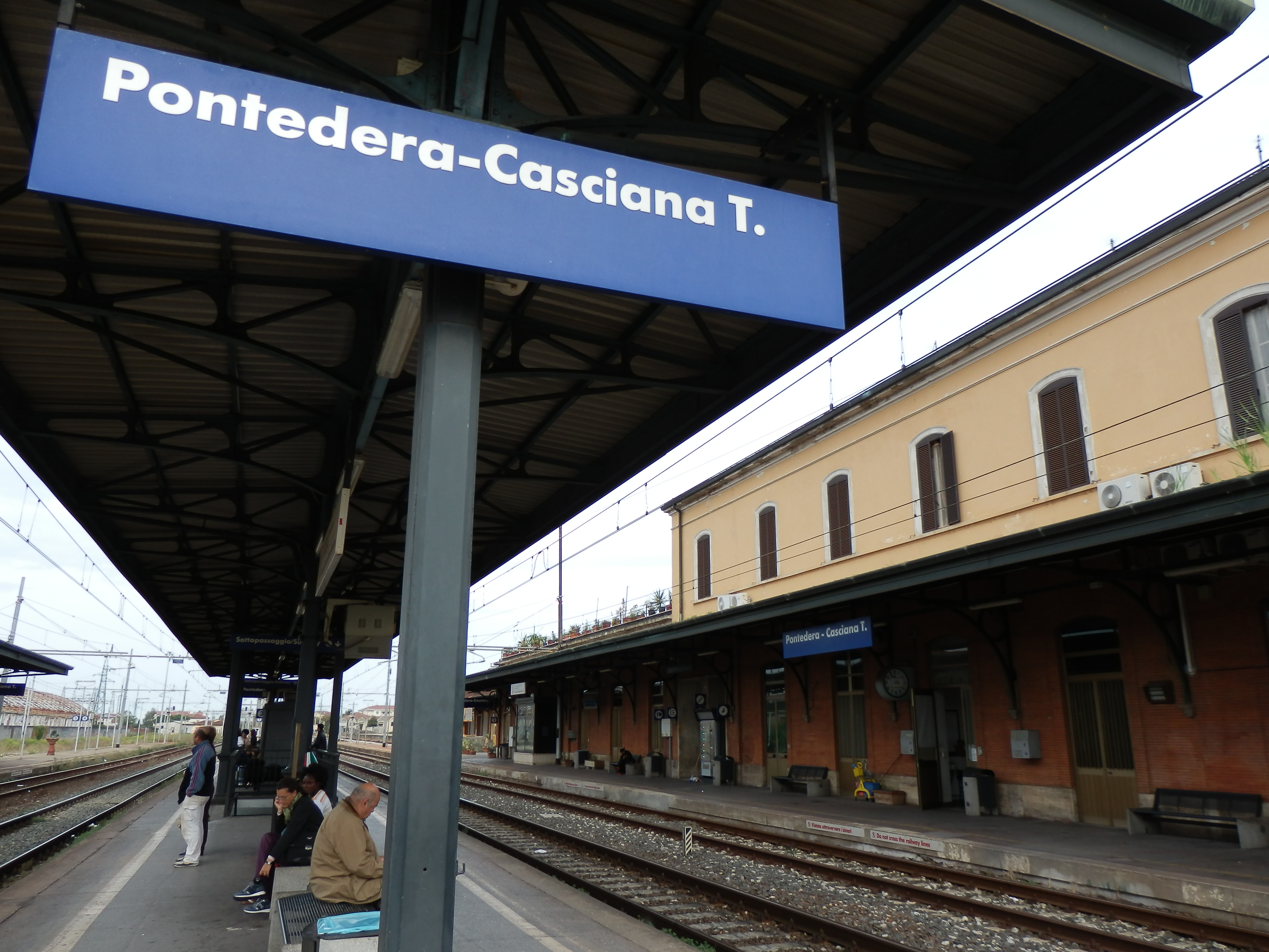 Stazione Pontedera-Casciana Terme - Cartello